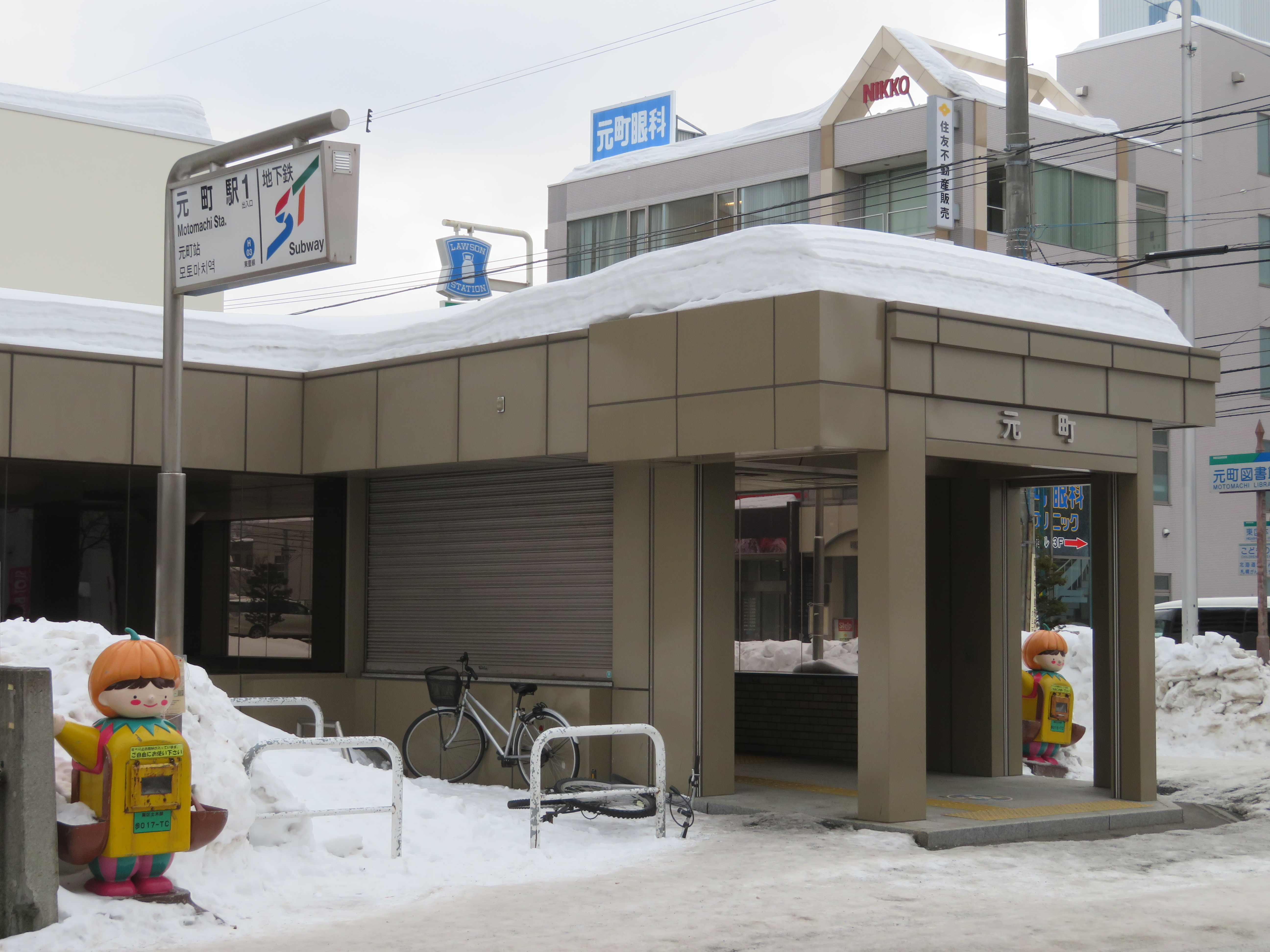 元町駅1番出入口 Canon PowerShot SX720 HS